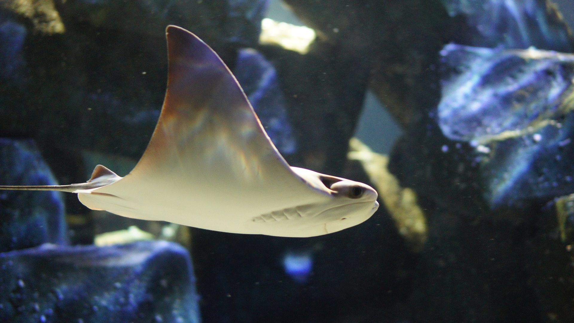 fotografiert im Sealife München